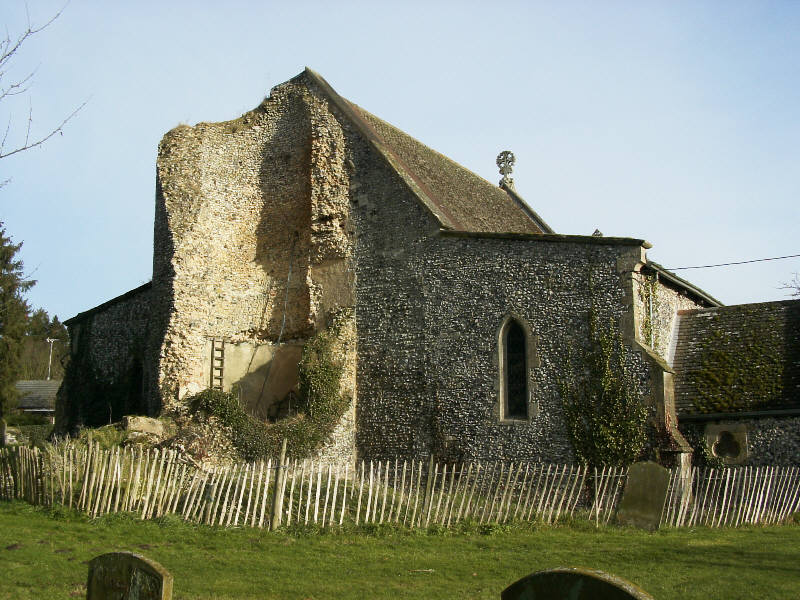 Beispiel für einen verfallenen Rundturm: Cockley Cley All Saints Church, Norfolk, England Sonstiges: freie Lizenz